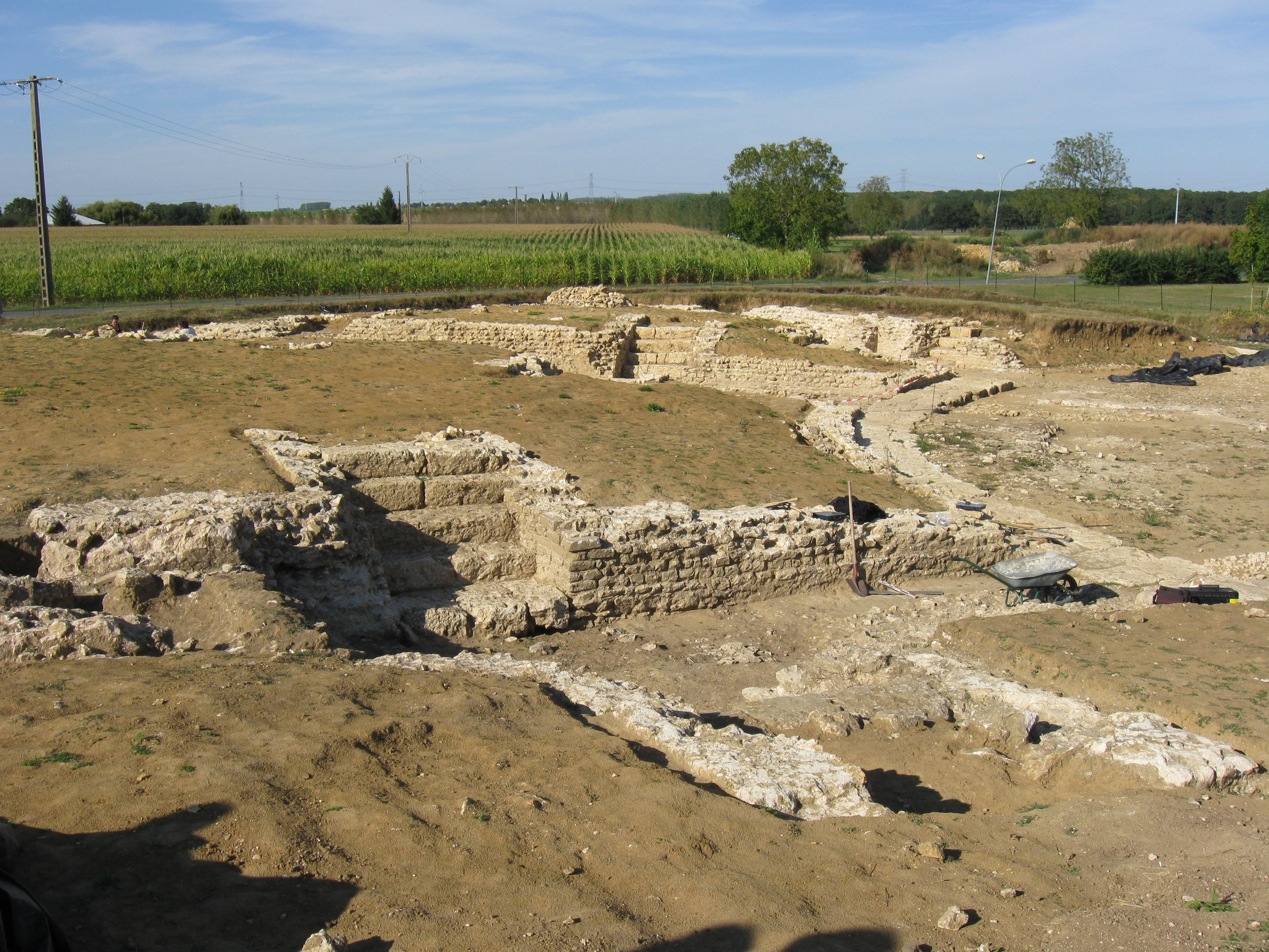 Fouilles archéologiques sur le site du théâtre antique de Châteaubleau (en 2012). (cad. A 239 et ZA 103). (département de la Seine et Marne, région Île-de-France).